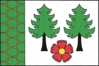 Medový Újezd, vlajka. List tvoří zelený žlutě plástvovaný žerďový pruh široký čtvrtinu délky listu a bílé pole se dvěma zelenými smrky. Mezi jejich černými kmeny u dolního okraje listu červená růže se žlutým semeníkem. Poměr šířky k délce listu je 2 : 3.